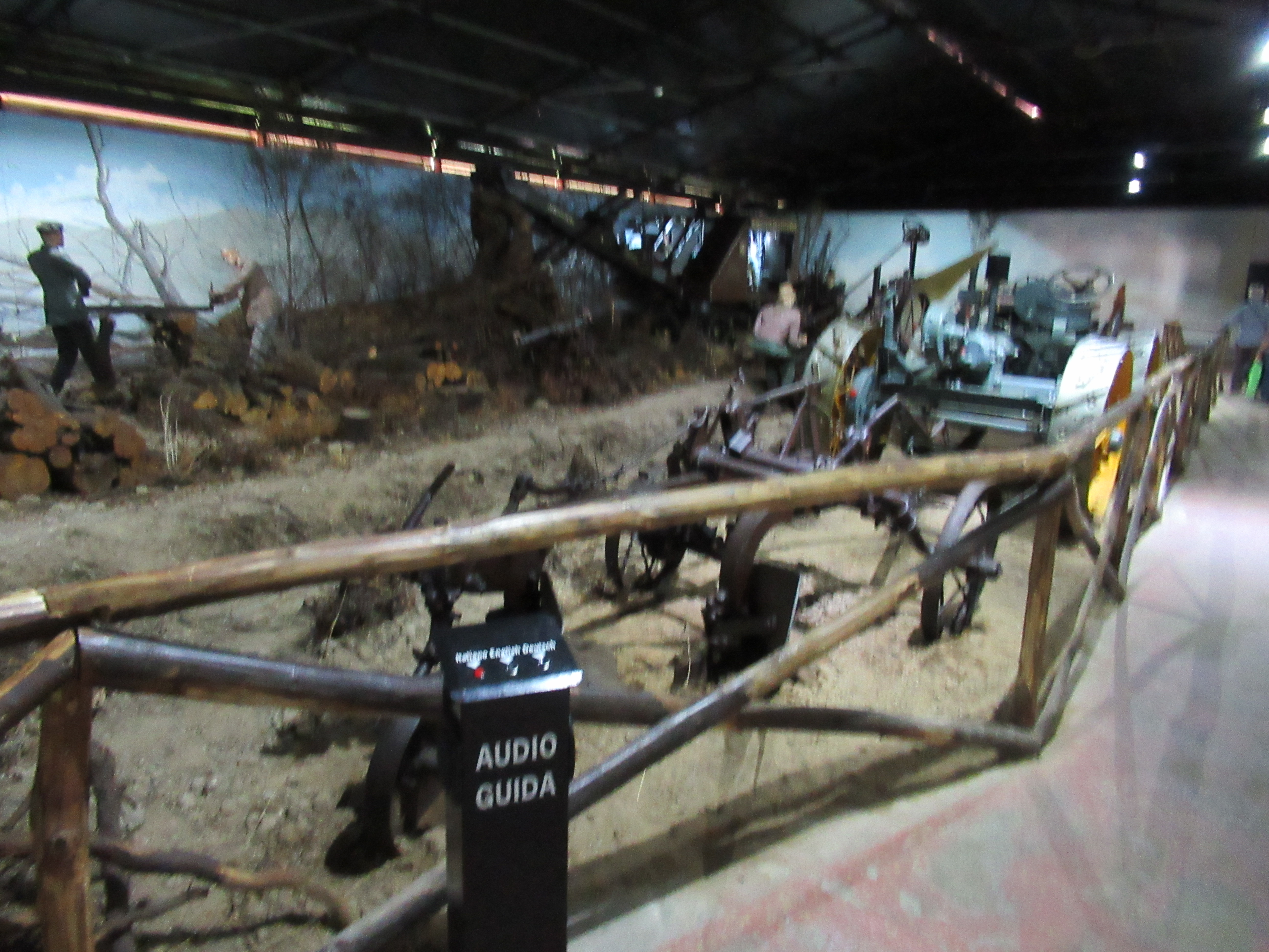 5 giugno 2018 Visita al padiglione Bonifica Pianura Pontina